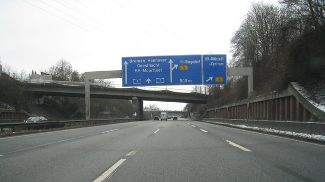 A1 - Kreuz (33), Hamburg-Billstedt (500m)